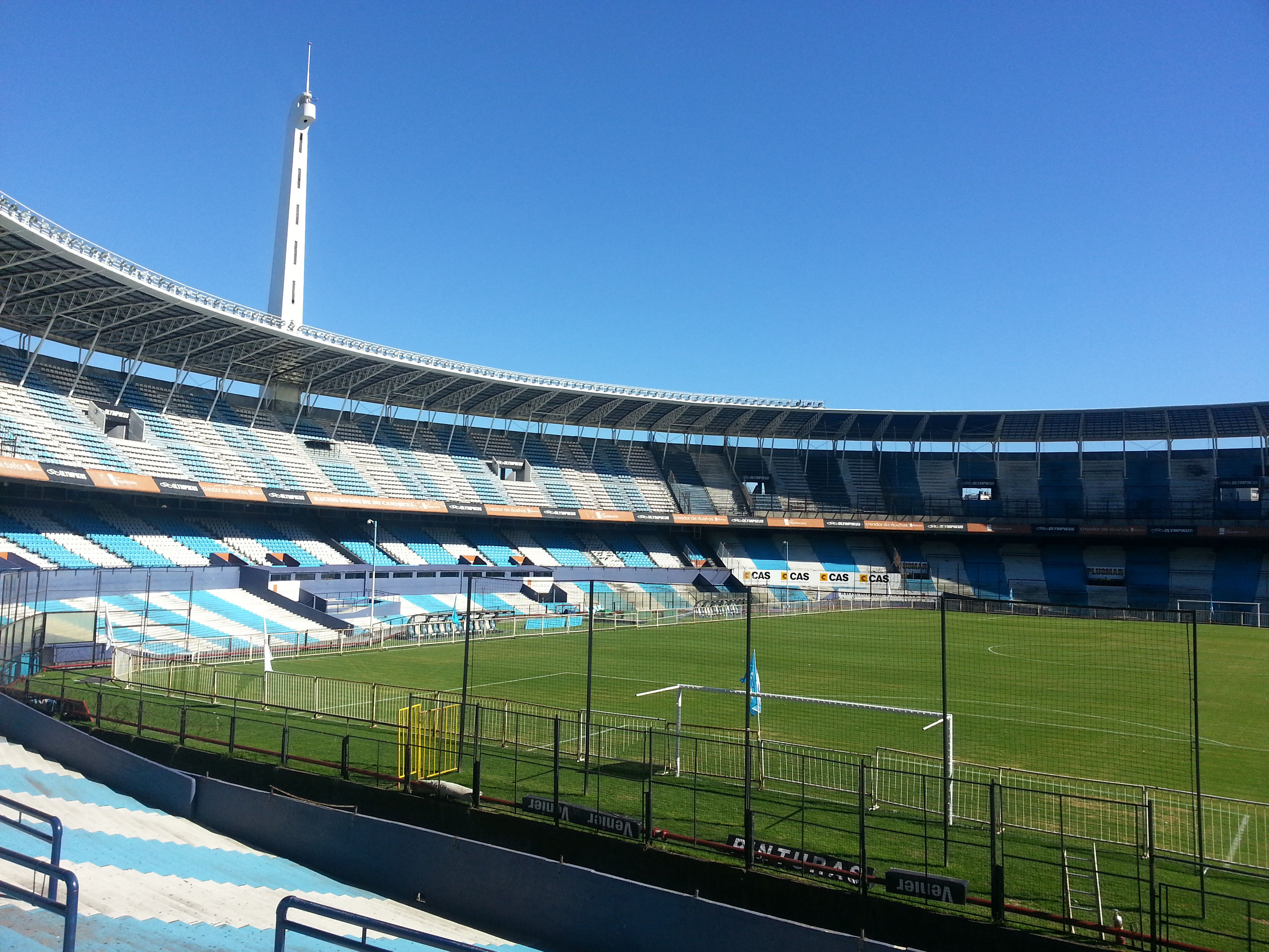 El Estadio Presidente Perón, propiedad del Racing Club de Avellaneda.